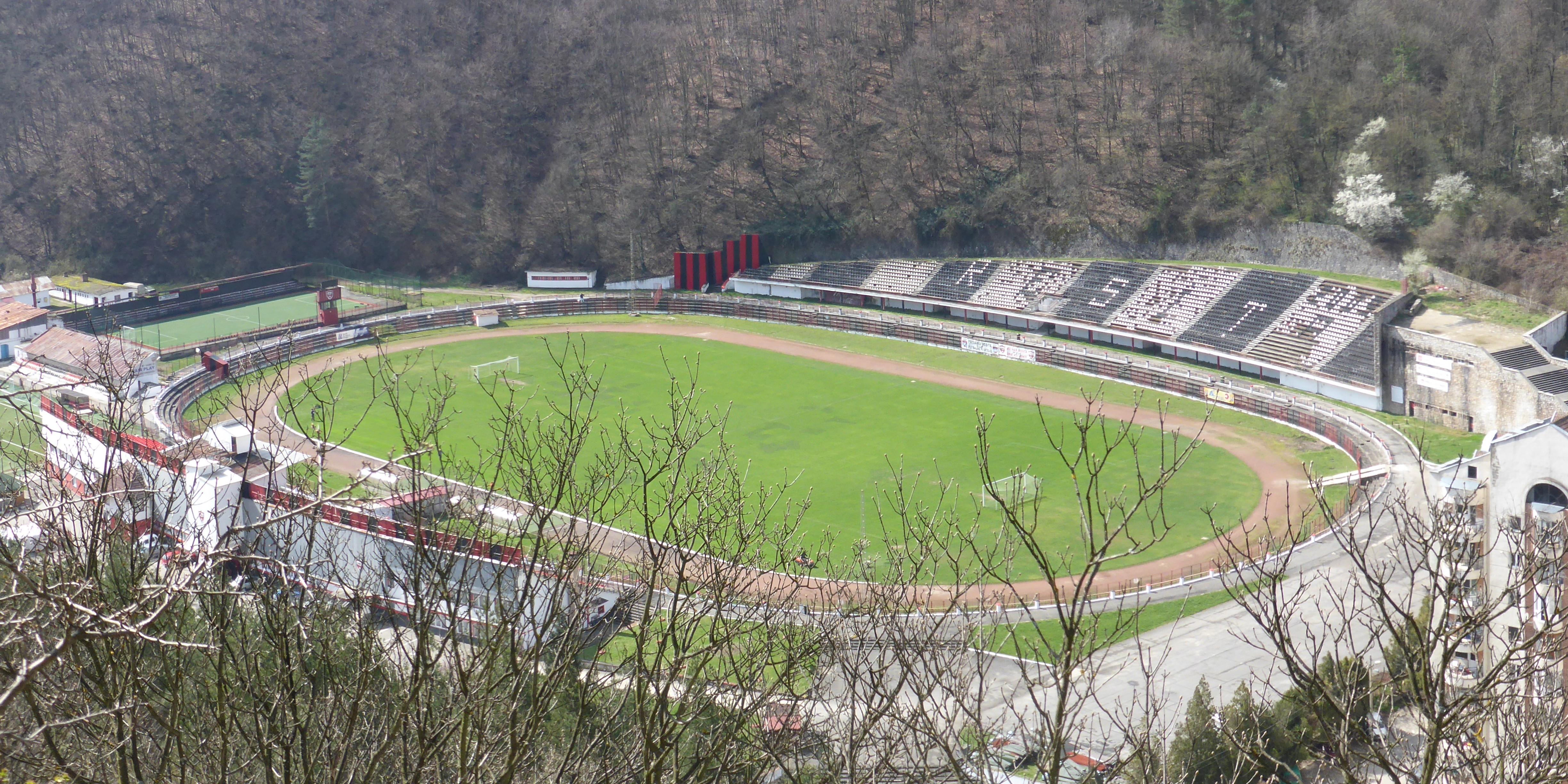 Mircea-Chivu-Stadion in Reschitz (Kreis Karasch-Severin, Rumänien).